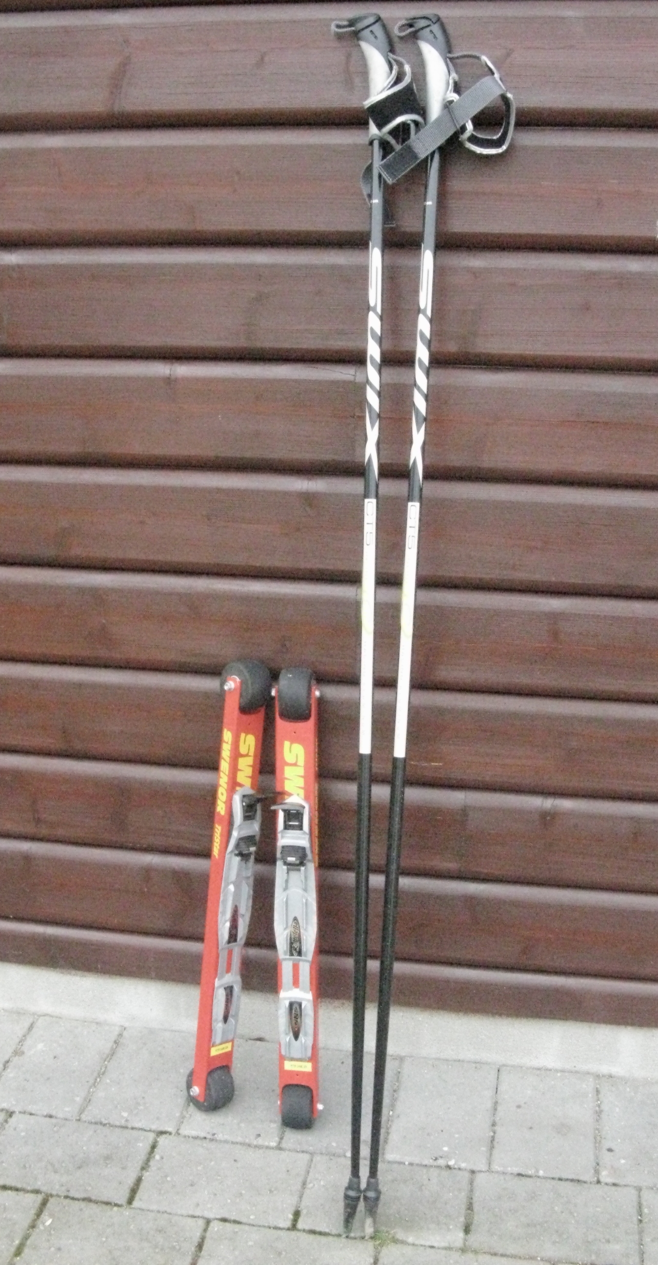 Rulleski med stave